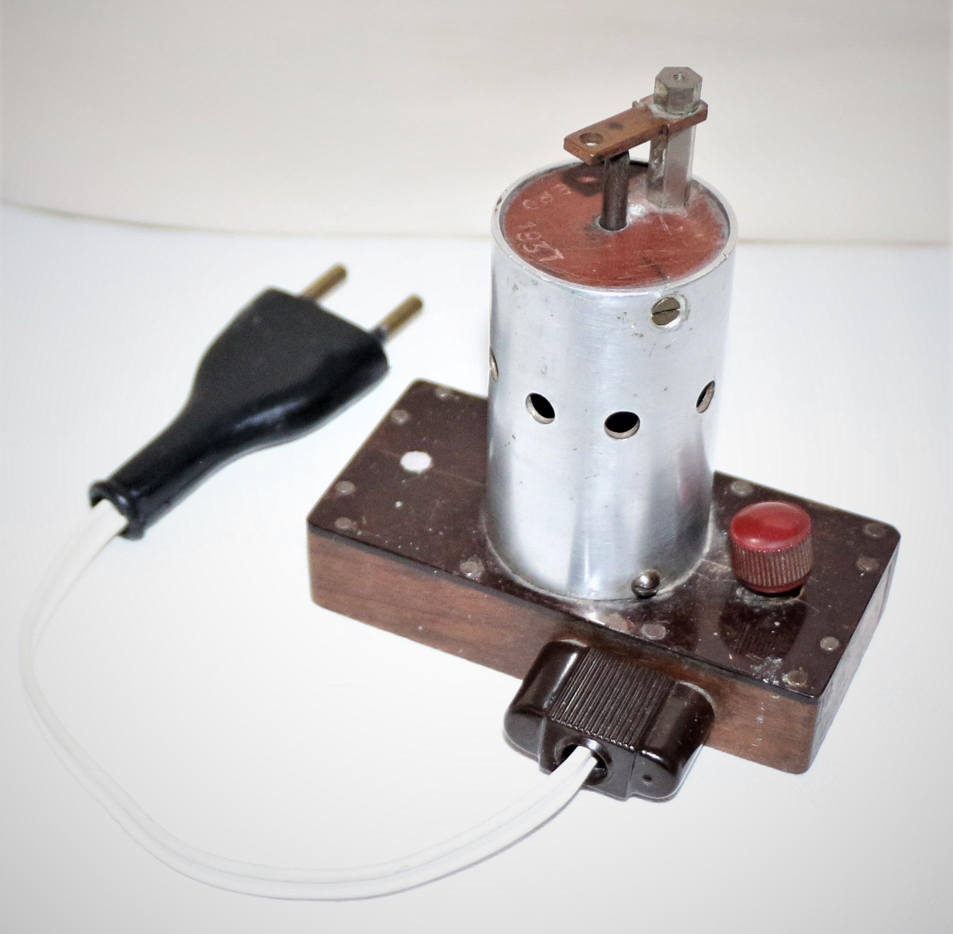 Accendino elettrico costruito da Piero Prampolini all'età di 12 anni, come dimostra la scritta "piero 1937" sulla parte superiore.